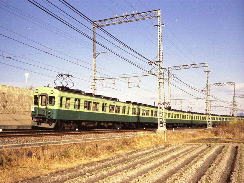 京阪本線樟葉（くずは） - 橋本間を走る700系電車（2代）Kurahashi様作成のファイルをMaximusM4がリサイズしたもの。(Created by Kurahashi,edit by MaximusM4)